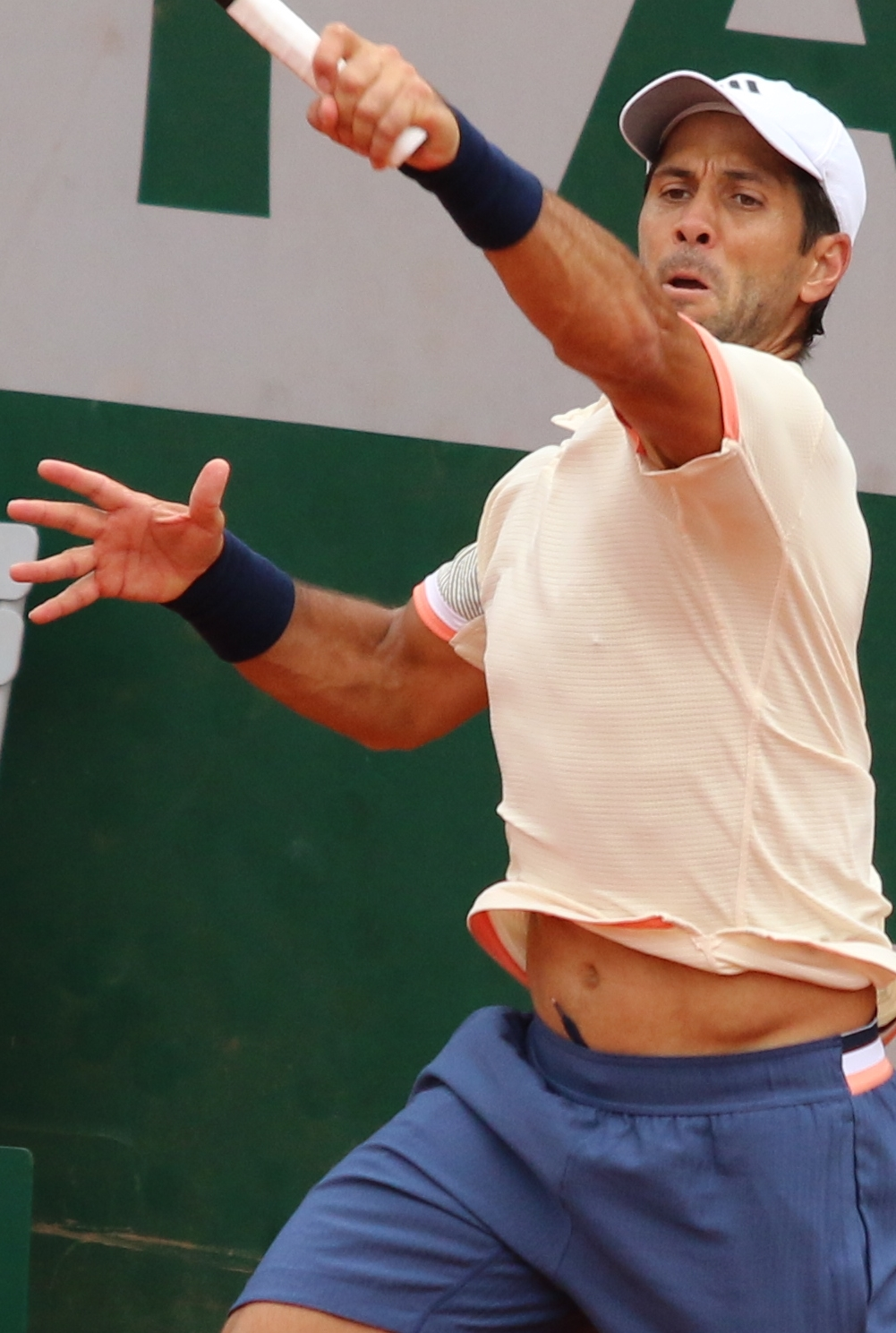 Verdasco RG18 (69)